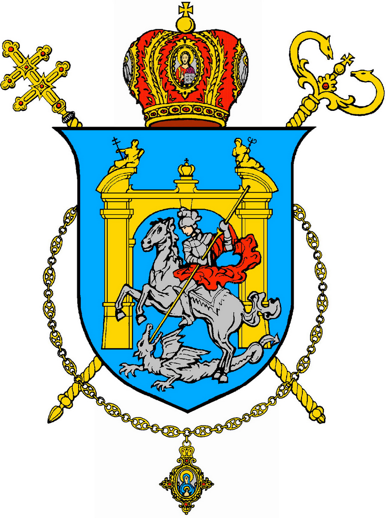 Герб Львовской архиепархии Украинской греко-католической церкви